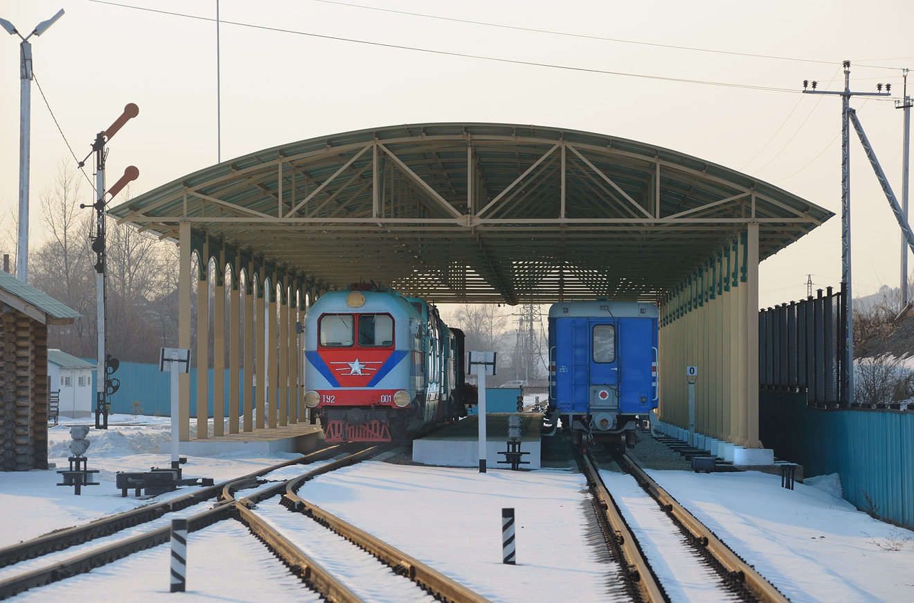 Станция Юность, Малая Амурская ЖД (Свободненская ДЖД), г. Свободный, Амурская область